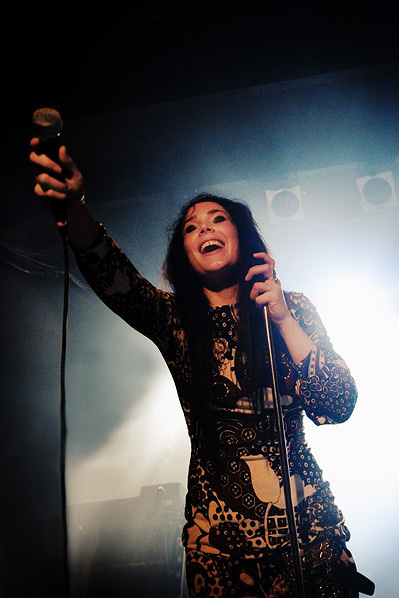 Brisa Roché live au Son'Art, Bordeaux, 21 mars 2008